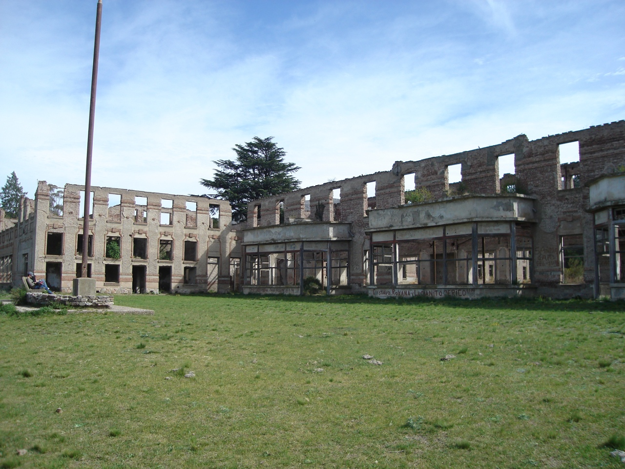 Vista parcial del estado actual del ex Club Hotel de la Ventana, Villa Ventana, Partido de Tornquist, Provincia de Buenos Aires, Argentina.